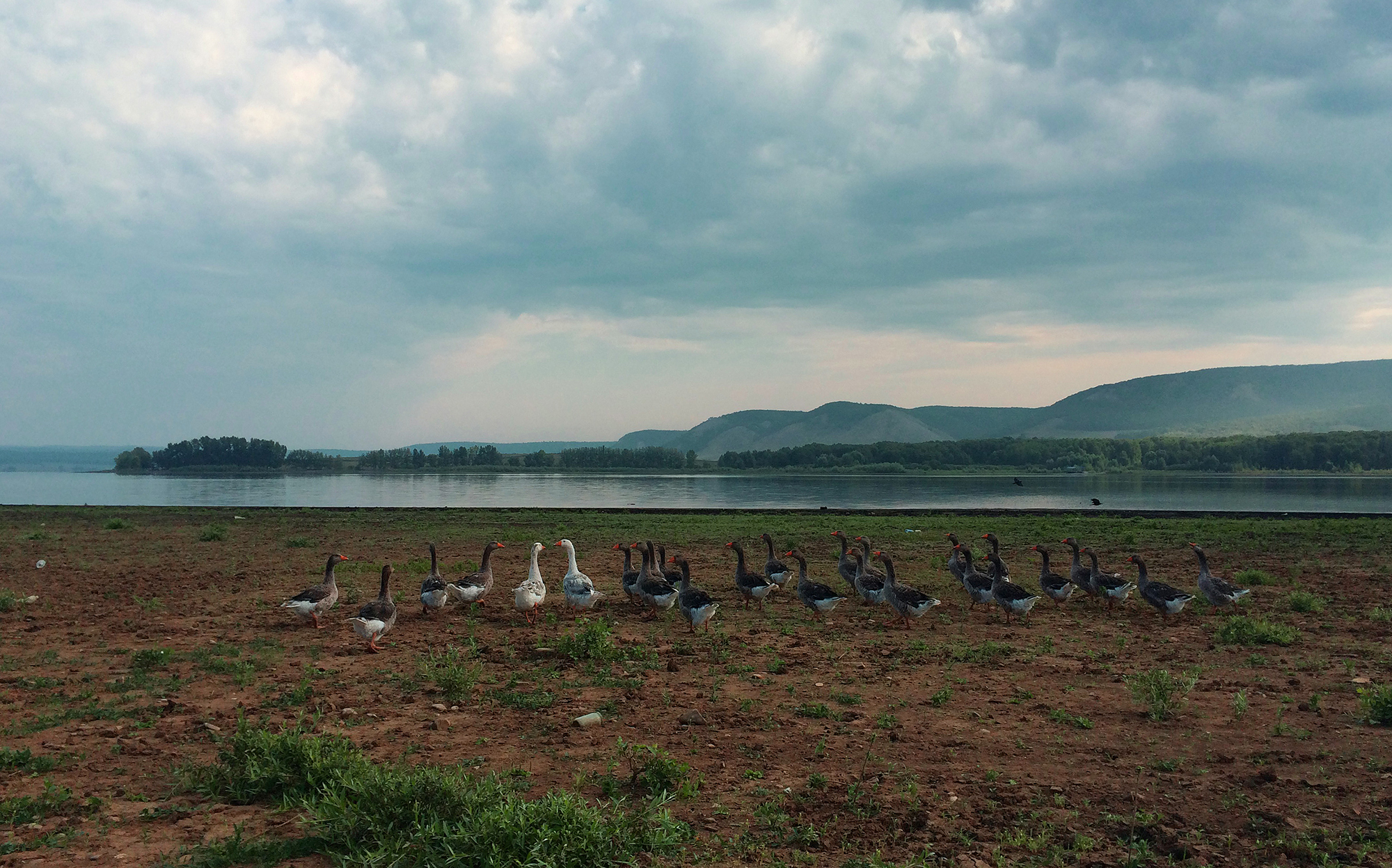 Башкирия, национальный парк: Национальный парк расположен на юго-западных склонах Южного Урала, к западу от водораздельного хребта Уралтау, в юго-восточной части Башкирии, Нугуш, Бурзянский, Кугурчинский, Мелеузовский район, Башкортостан This image is related to the protected area of Russia number 0200098